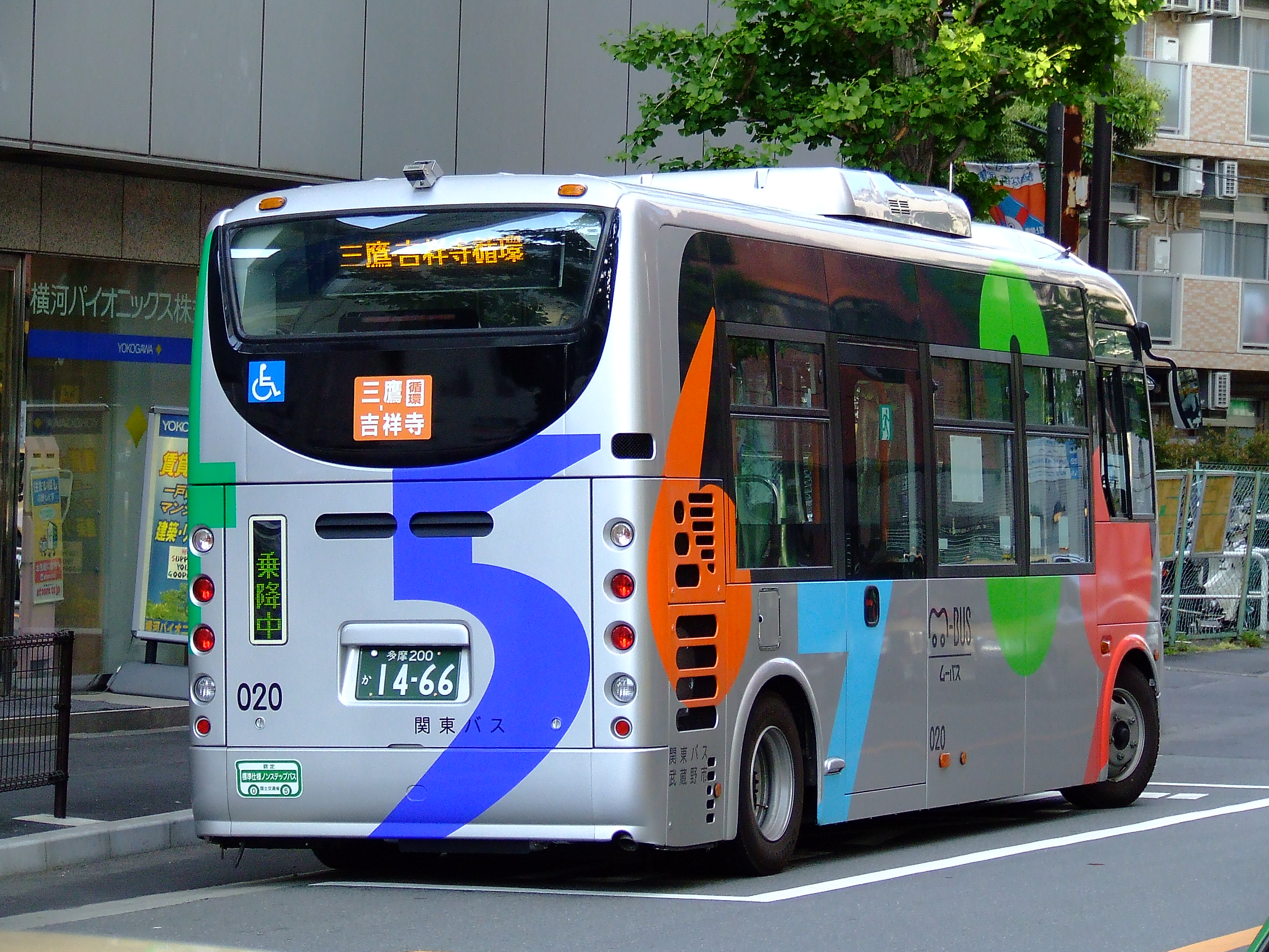 関東バス・武蔵野市のコミュニティバス「ムーバス」三鷹・吉祥寺循環 日野・ポンチョ後部 三鷹駅付近にて